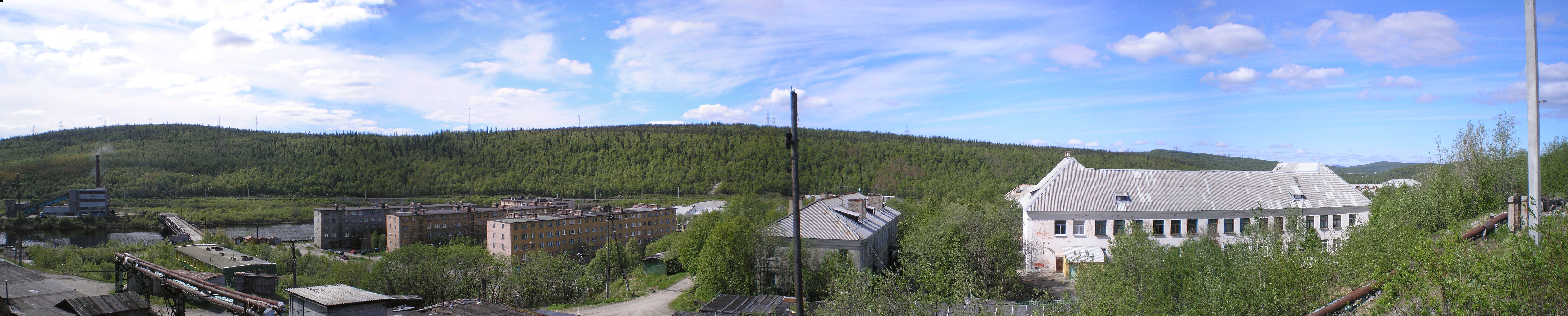 Панорама Кильдинстроя